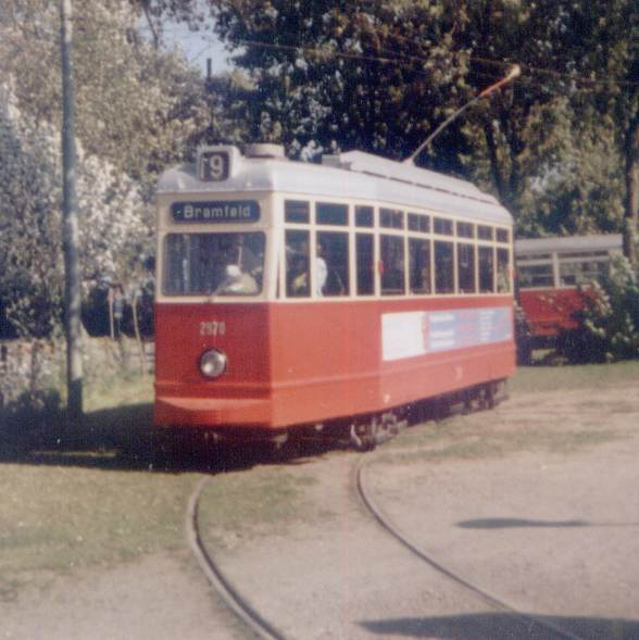 Hamburg, Tramway, V3-Typ. Museumsbetrieb VVM, Schönberger Strand bei Kiel, Germany.